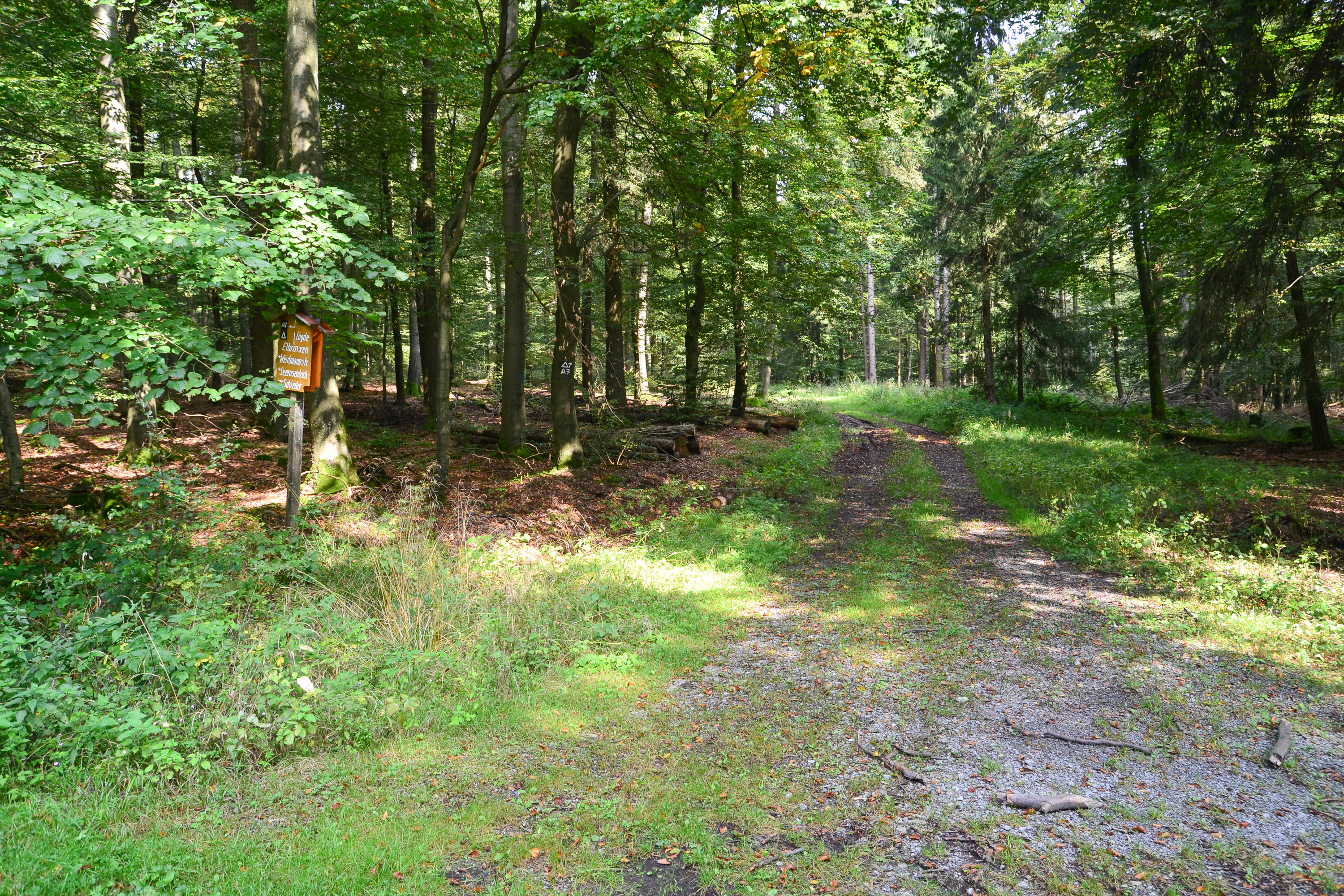 Naturschutzgebiet Schwalenberger Wald, Lügder Teil